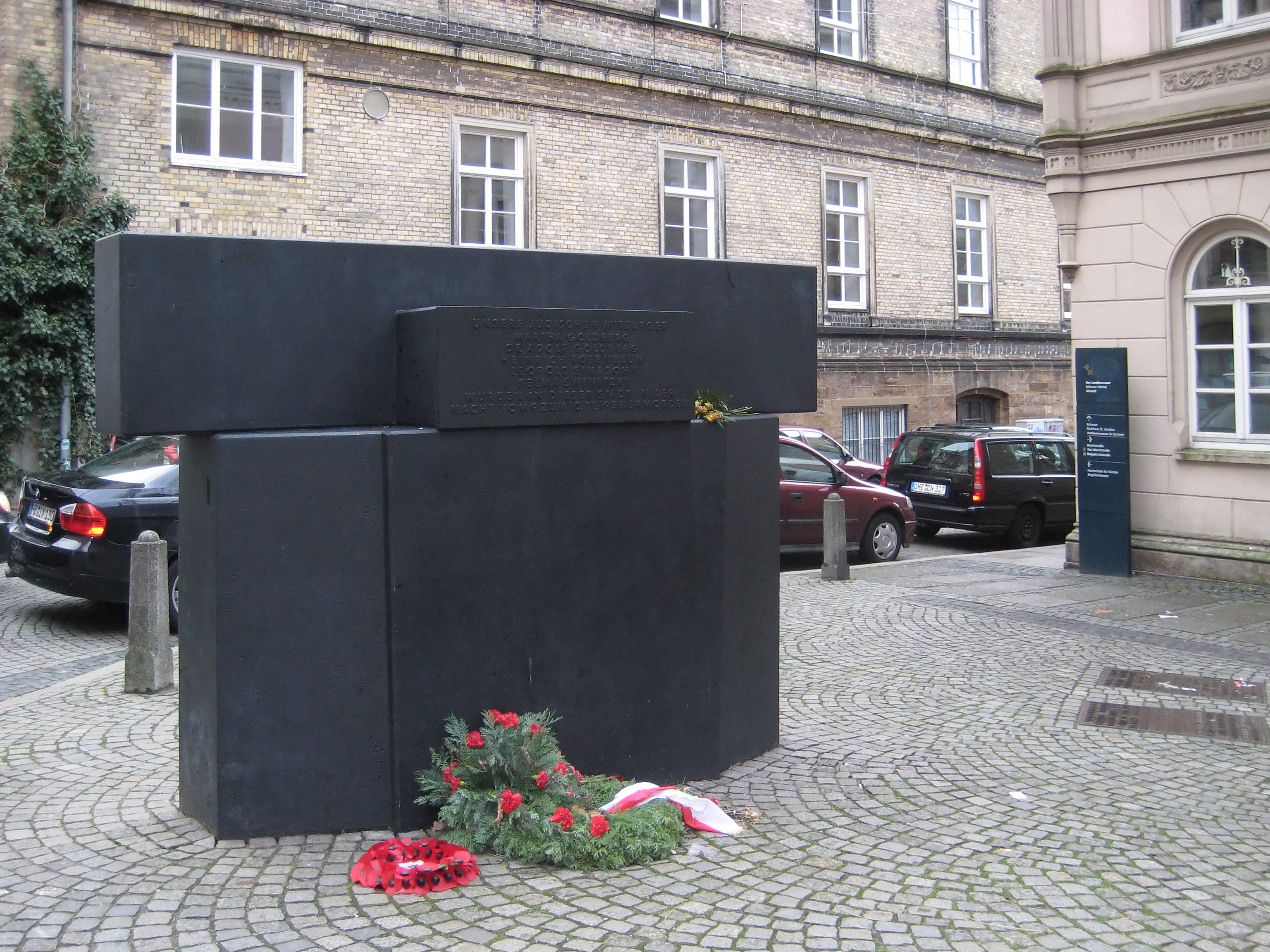 Mahnmal für die Opfer der „Reichskristallnacht“ (Reichspogromnacht) in Bremen, Deutschland. Das Mahnmal befindet sich in Bremen-Schnoorviertel, beim Haus Landherrn-Amt.